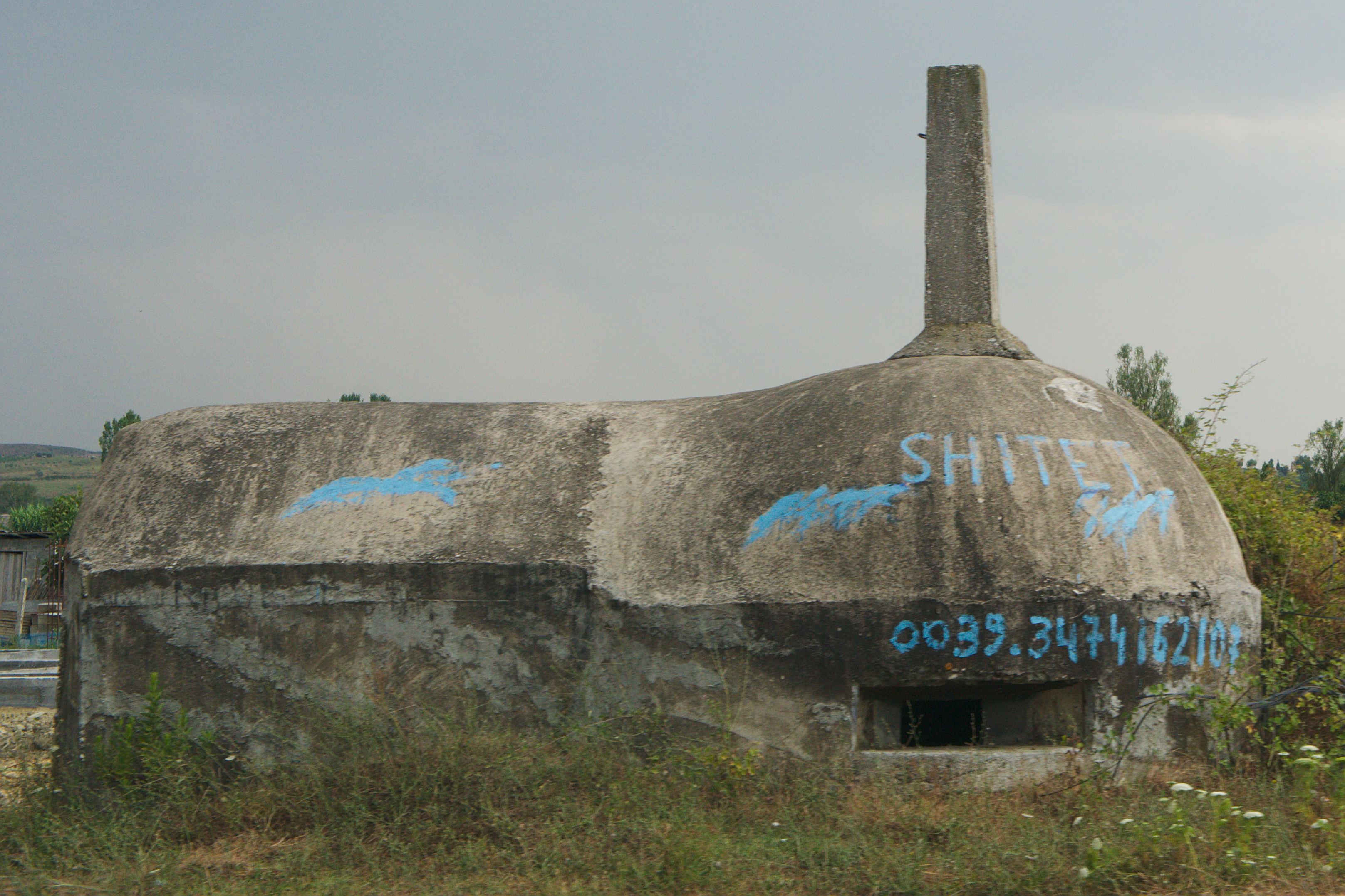 Bunker Albanais .